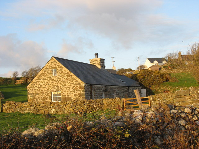 Bwlch y Garreg Wen cottage on Gallt y Rhiw